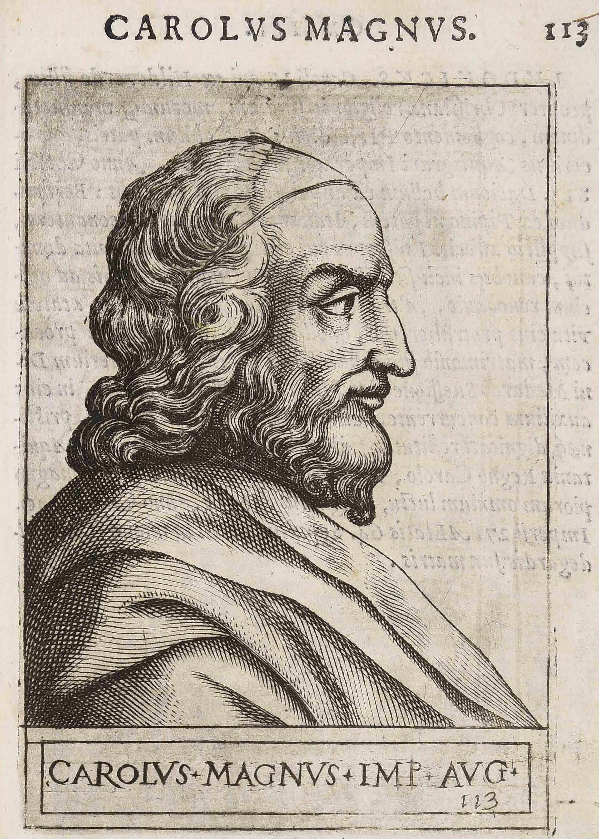 Calcografia in Giovanni Battista Cavalieri & Thomas Treterus, Romanorum imperatorum effigies, Roma, Vincenzo Accolti, 1583.